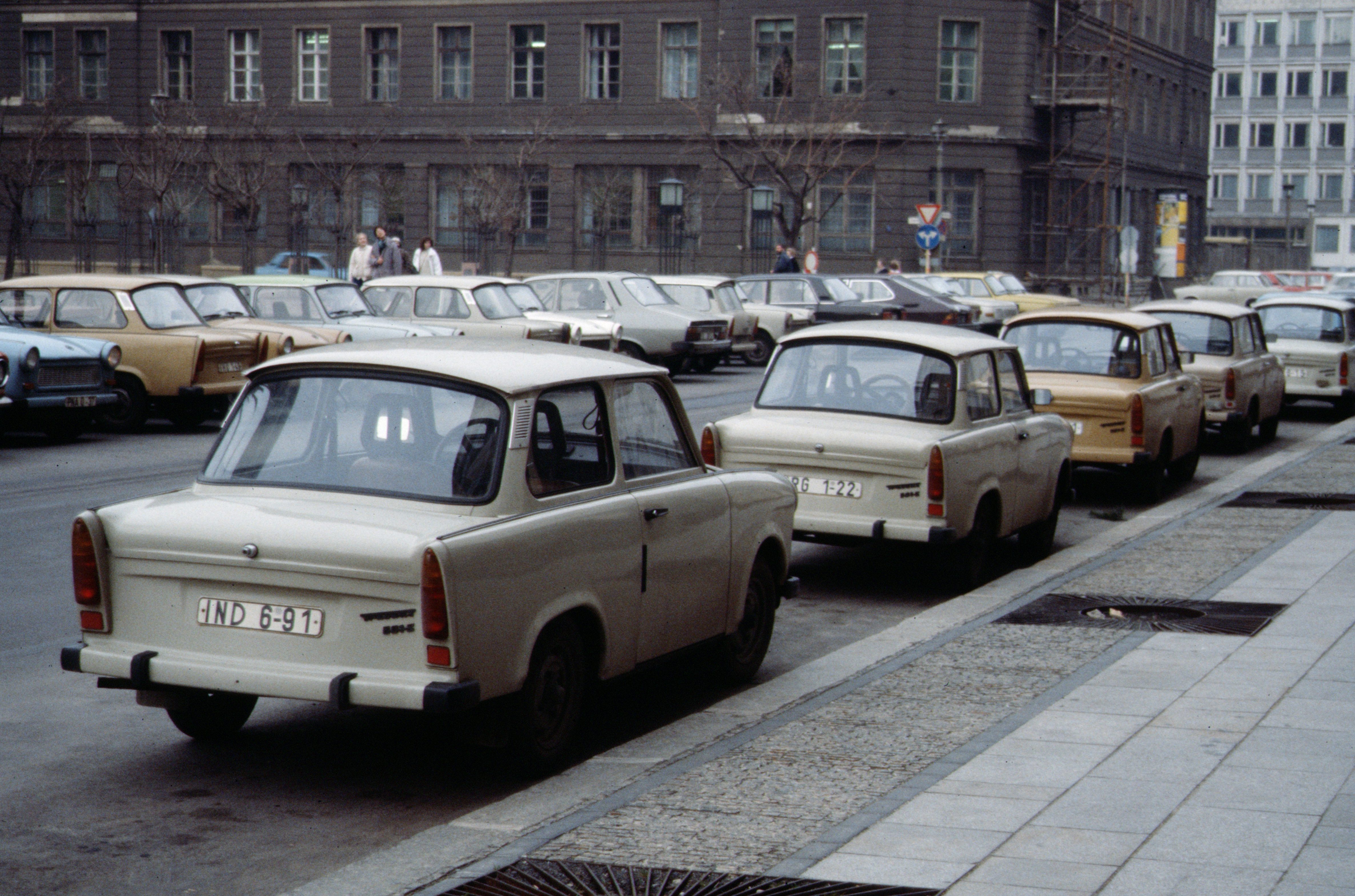 Berlin 1989, Fall der Mauer, Chute du mur